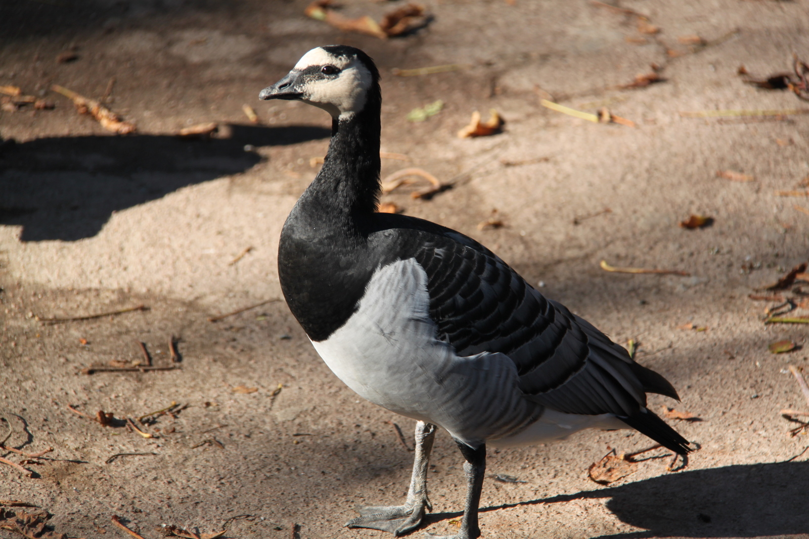 Zoo de Lille